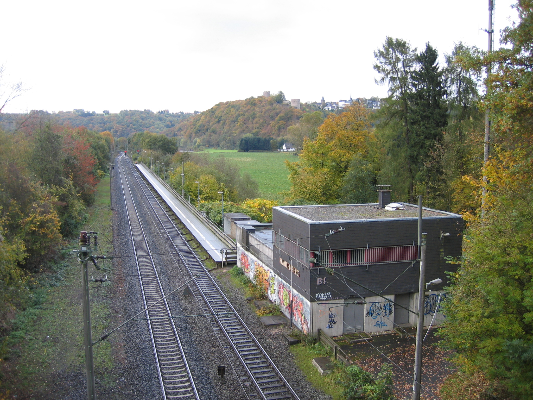 S-Bahnhof Blankenberg an der Siegstrecke